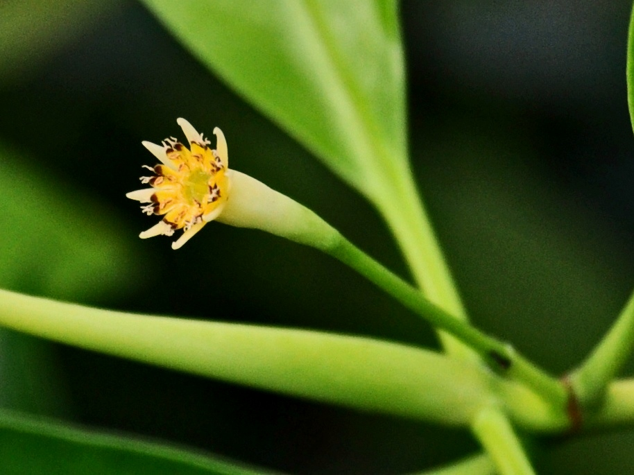 Bunga lenggadai (Bruguiera parviflora). Dari Kotabaru, Kalimantan Selatan.Unknown lenggadai (bruguiera parviflora) flower. from kotabaru, south kalimantan, indonesia.